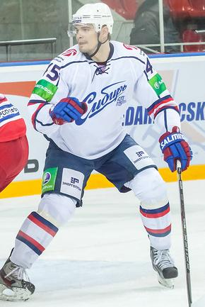 Защитник новосибирской «Сибири» Александр Кутузов во время матча чемпионата КХЛ против московского ЦСКА 28 октября 2012 года.